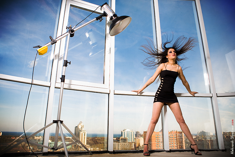 Использование моноблока при съемке